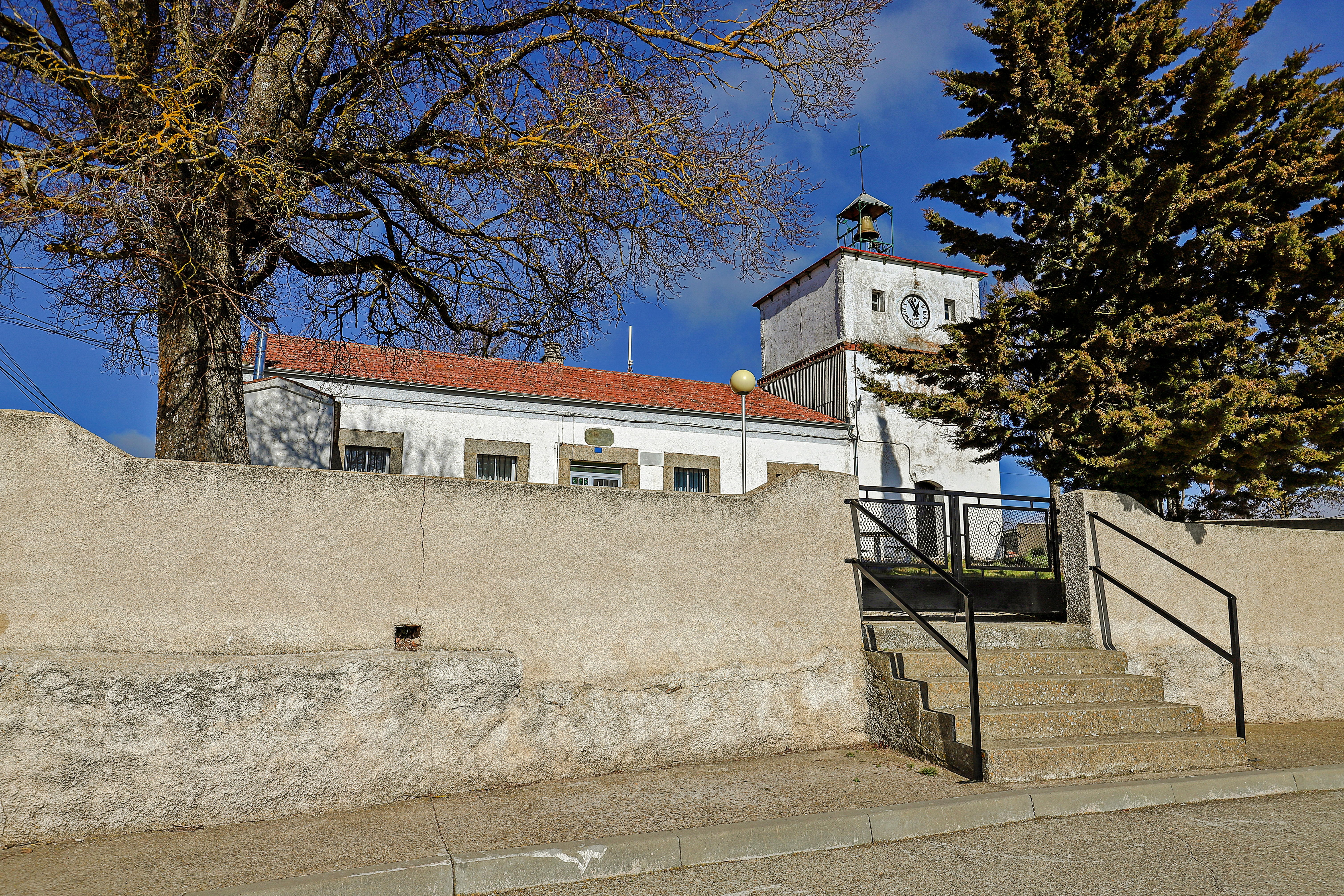 Frades de la Sierra municipio de la comarca de Entresierras, en la provincia de Salamanca